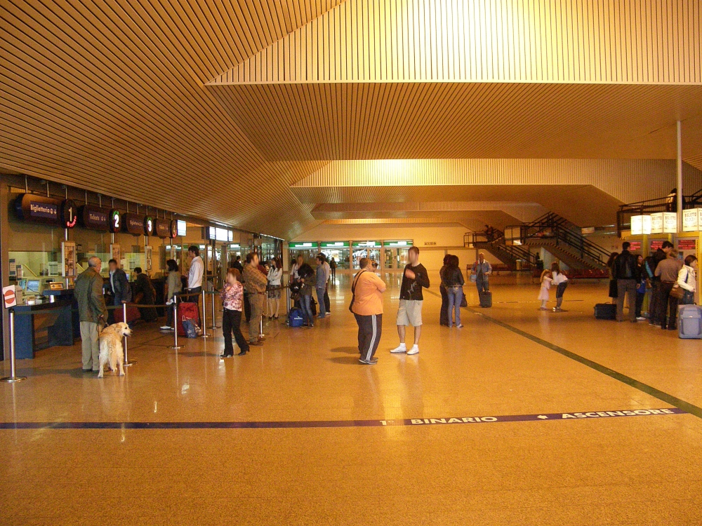 In der "Stazione Centrale" in Pescara